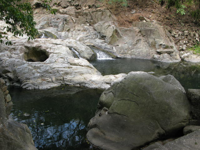 中文（香港）: 香港荃灣曹公潭，近照潭徑